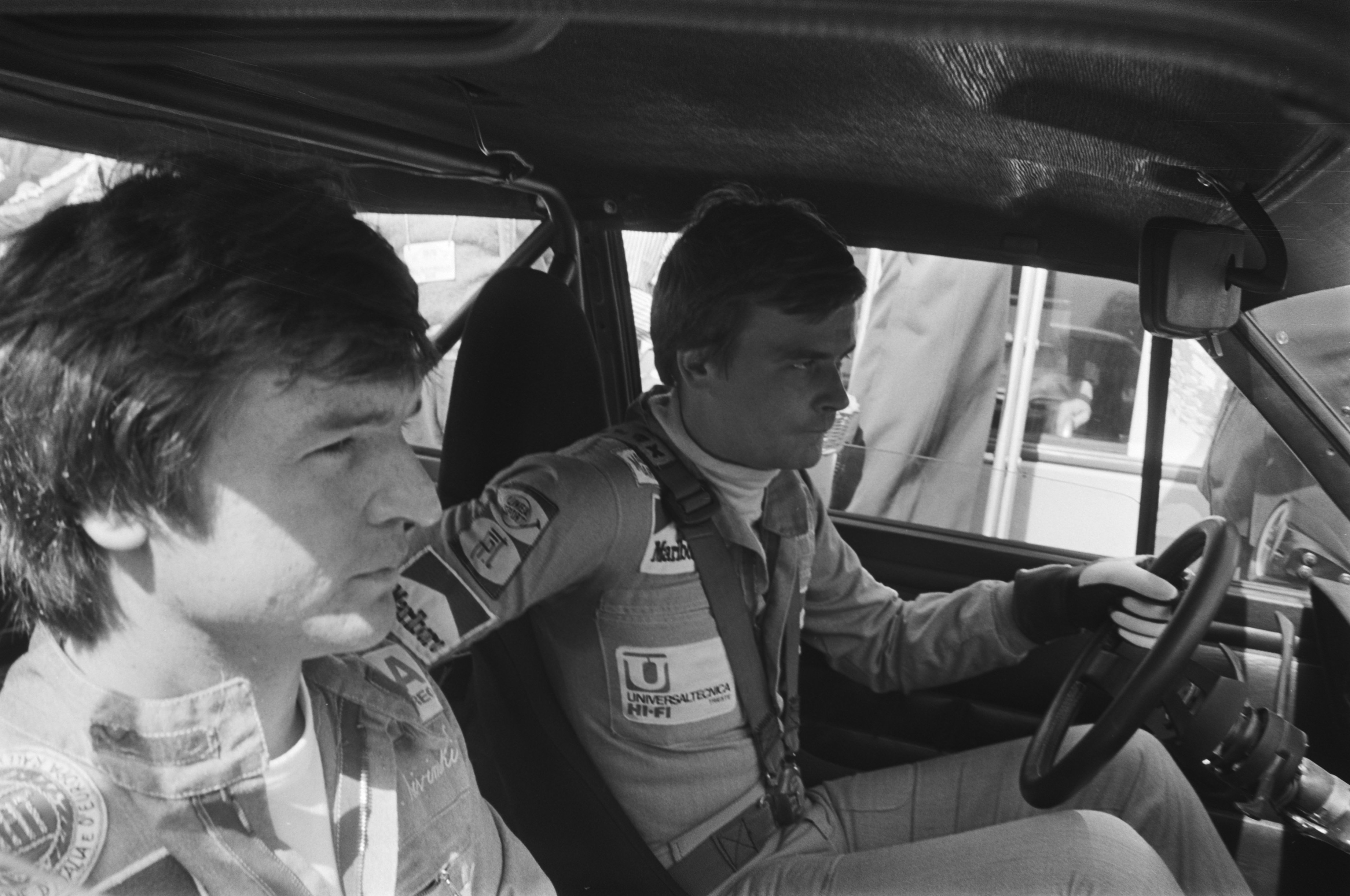 Collectie / Archief : Fotocollectie Anefo Reportage / Serie : [ onbekend ] Beschrijving : Start Tulpenralley in Rotterdam; Finnen Kivimaki (links) en Alen (rechts) in auto Datum : 23 april 1976 Locatie : Rotterdam, Zuid-Holland Trefwoorden : Autoraces, coureurs Instellingsnaam : Tulpenrally Fotograaf : Croes, Rob C. / Anefo Auteursrechthebbende : Nationaal Archief Materiaalsoort : Negatief (zwart/wit) Nummer archiefinventaris : bekijk toegang 2.24.01.05 Bestanddeelnummer : 928-5362